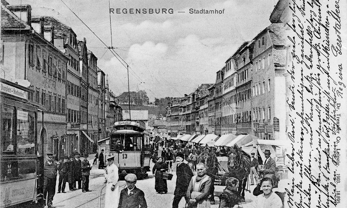 Ansichtskarte: Regensburg - Stadt am Hof - Straßennbahn im Jahr 1903